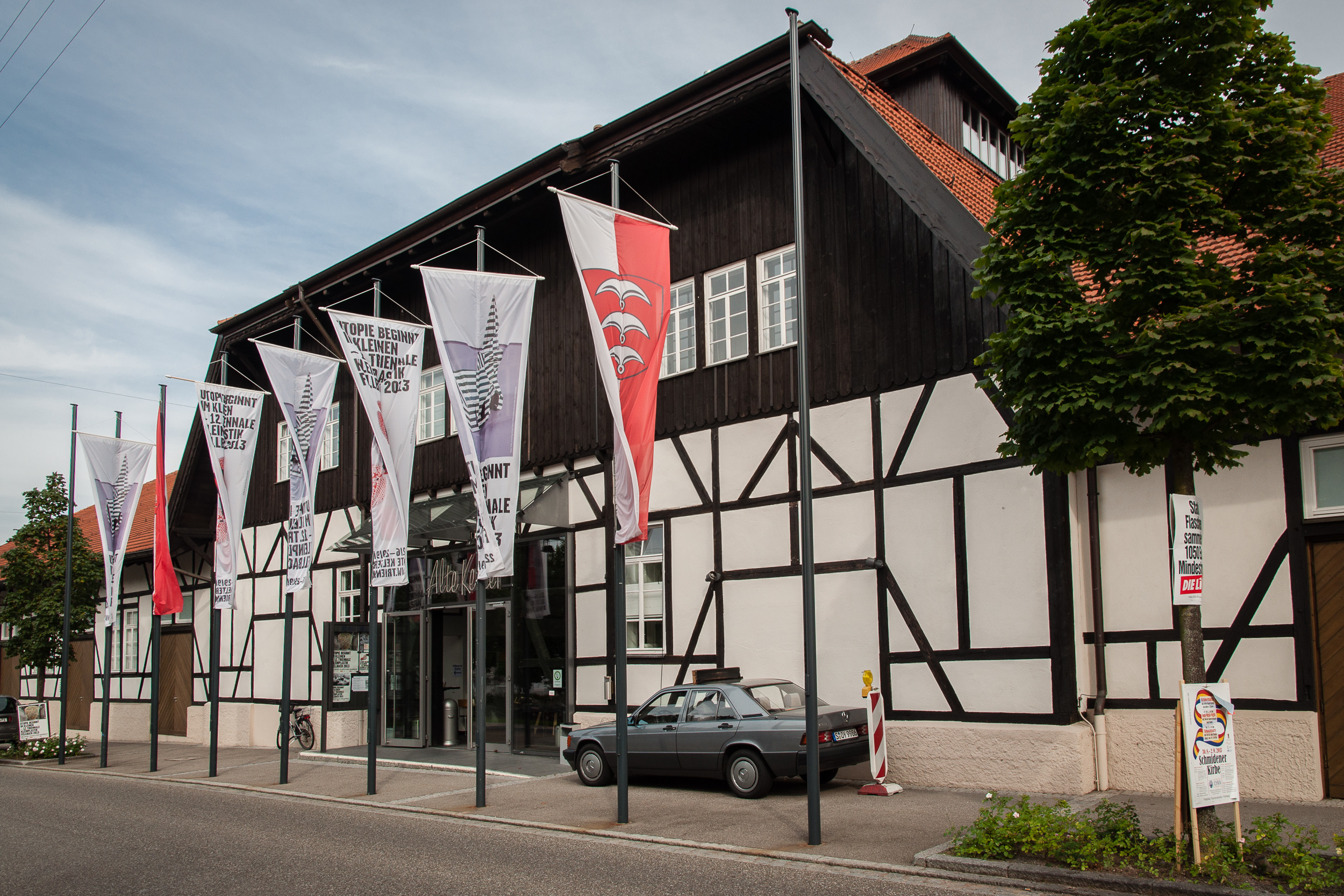 Haupteingang der Alten Kelter in Fellbach während der Triennale Kleinplastik 2013.